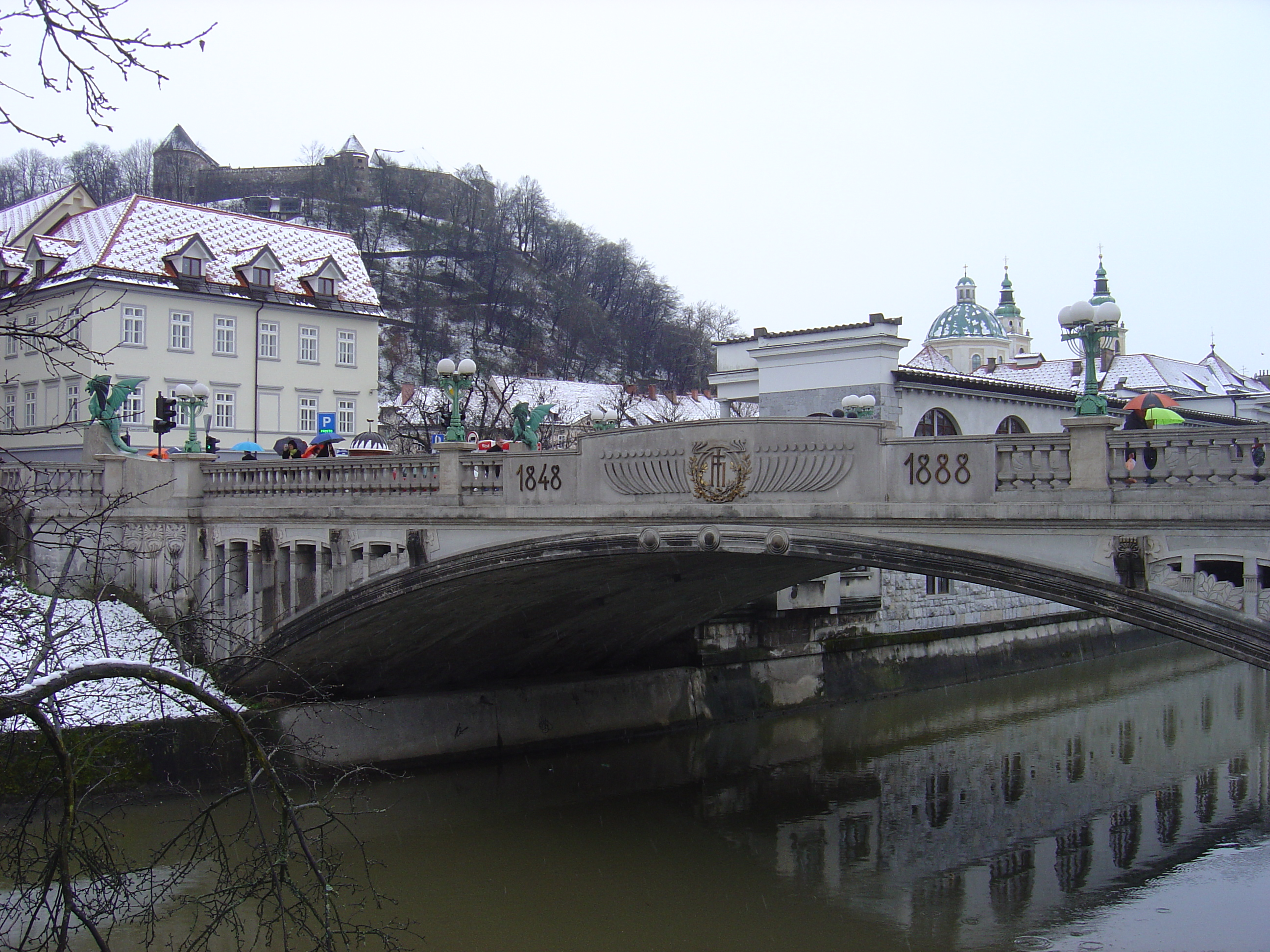 Ljubljana, Slovenia